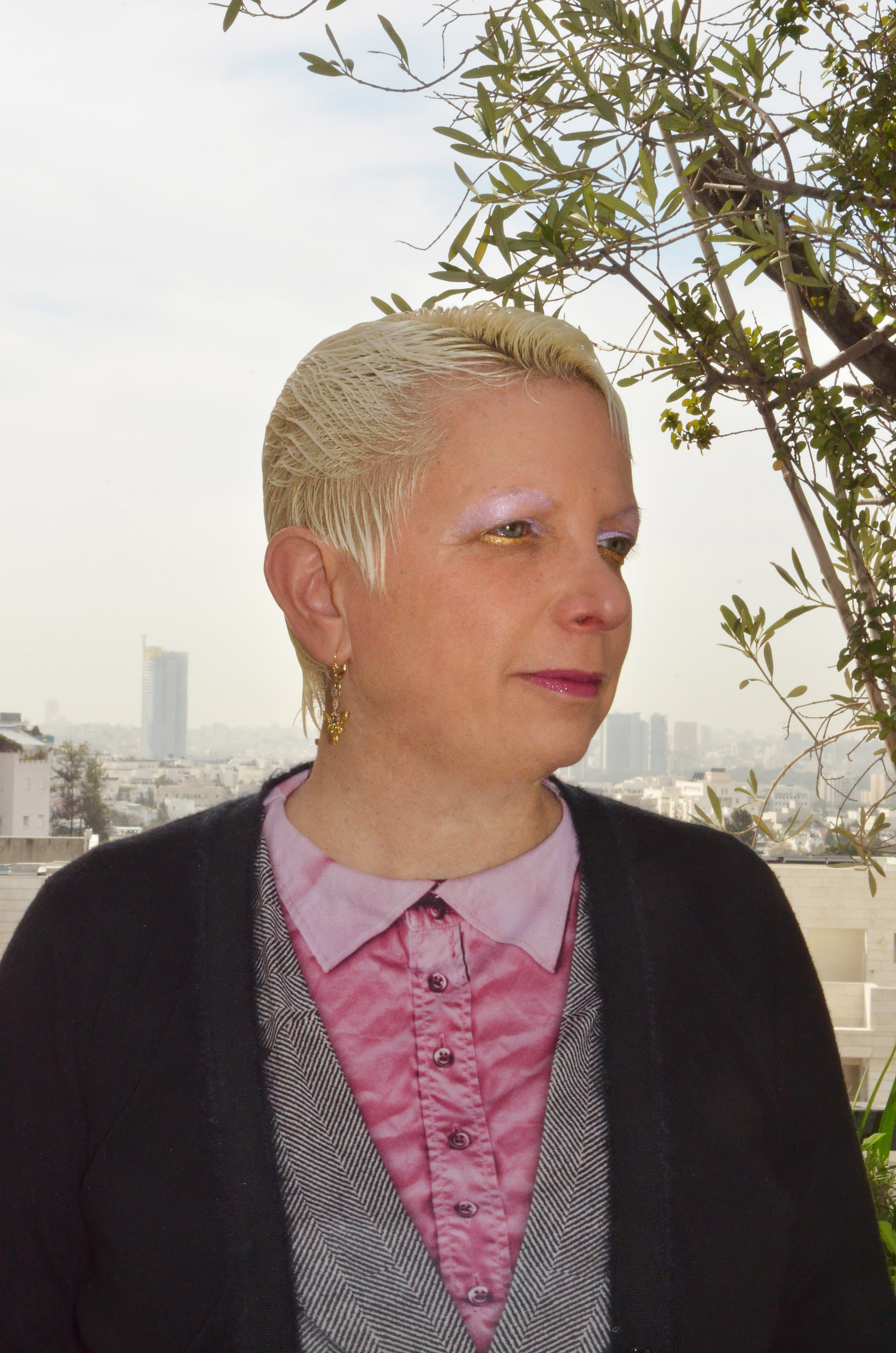 פורטרט דורית פלדמן 2014 Dorit Feldman Portrait 2014